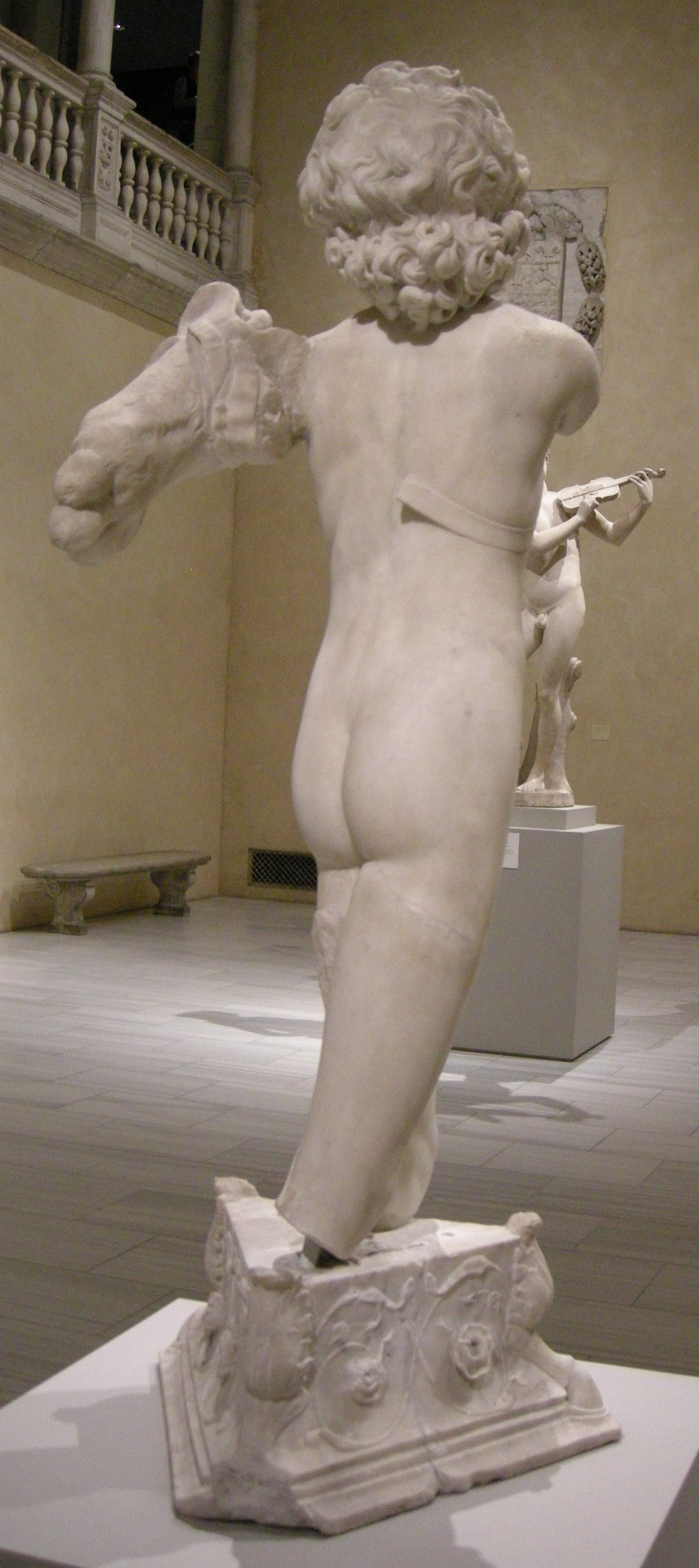 Michelangelo (attr.), giovane arciere, 1491-92 ca.